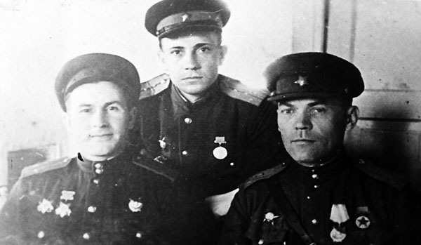 Слева на право: начальник политотдела 117-й дивизии подполковник В. В. Кабанов, адъютант командира дивизии капитан Барвитский, командир 117-й стрелковой дивизии Т. И. Волкович, февраль 1944